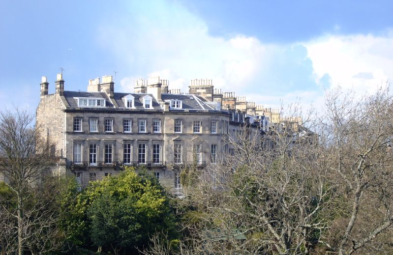 Eton Terrace